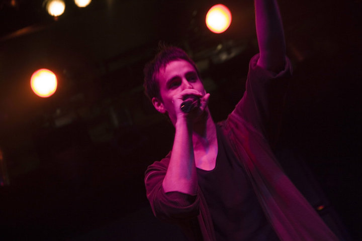 Beatmac en la sala Heineken de Madrid en el 2008